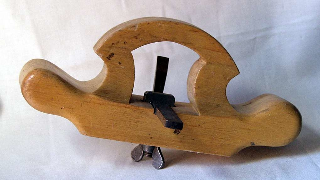 Grundthøvel / grunnhøvel. Stempel/signatur : Stpl.: MÄRKE/HISRCH 8m/m FWB.